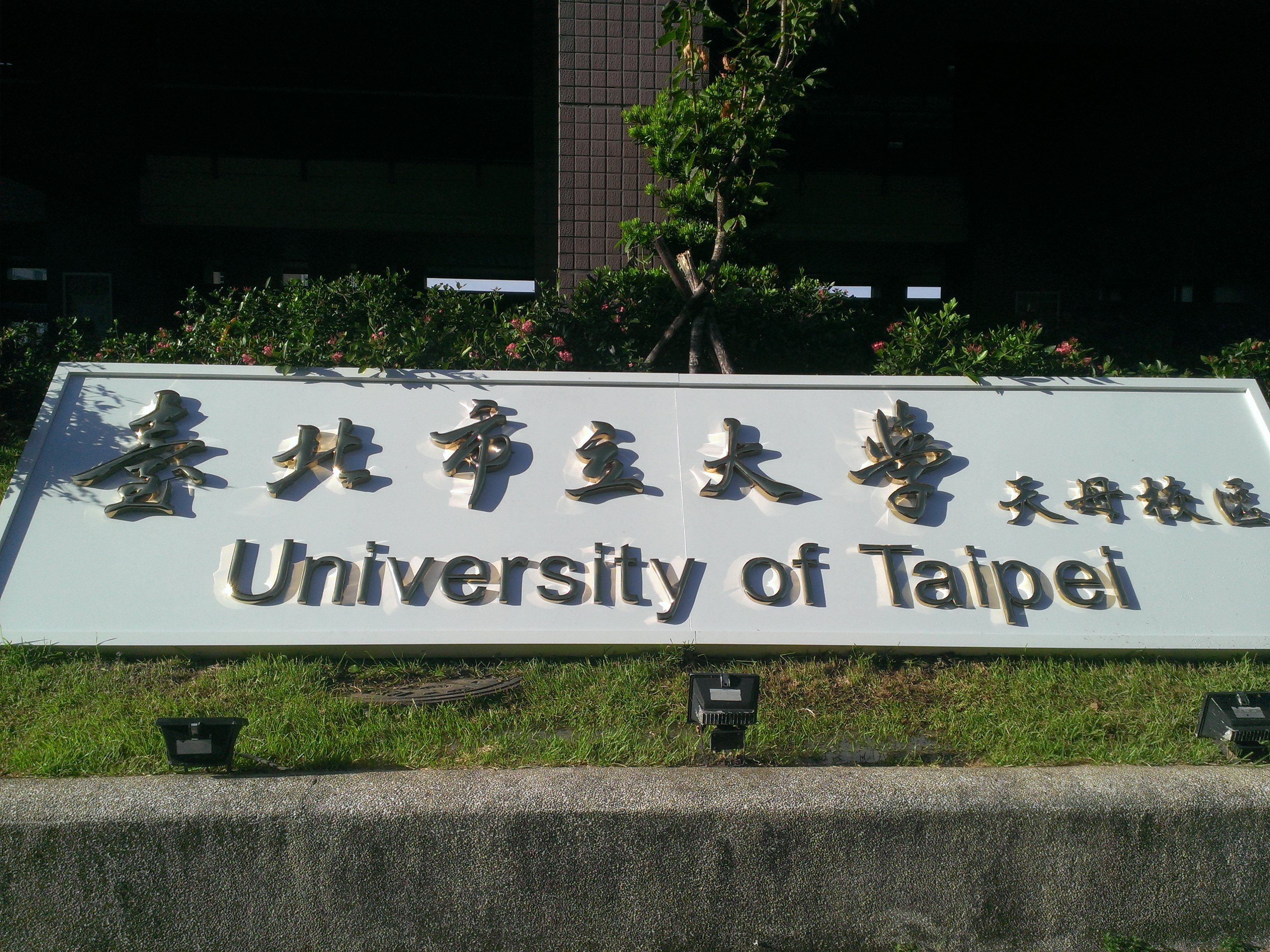 臺北市立大學天母校區鑄字招牌。